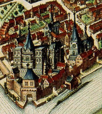 Abbaye Saint Jacques de Liège au XVIIe siècle